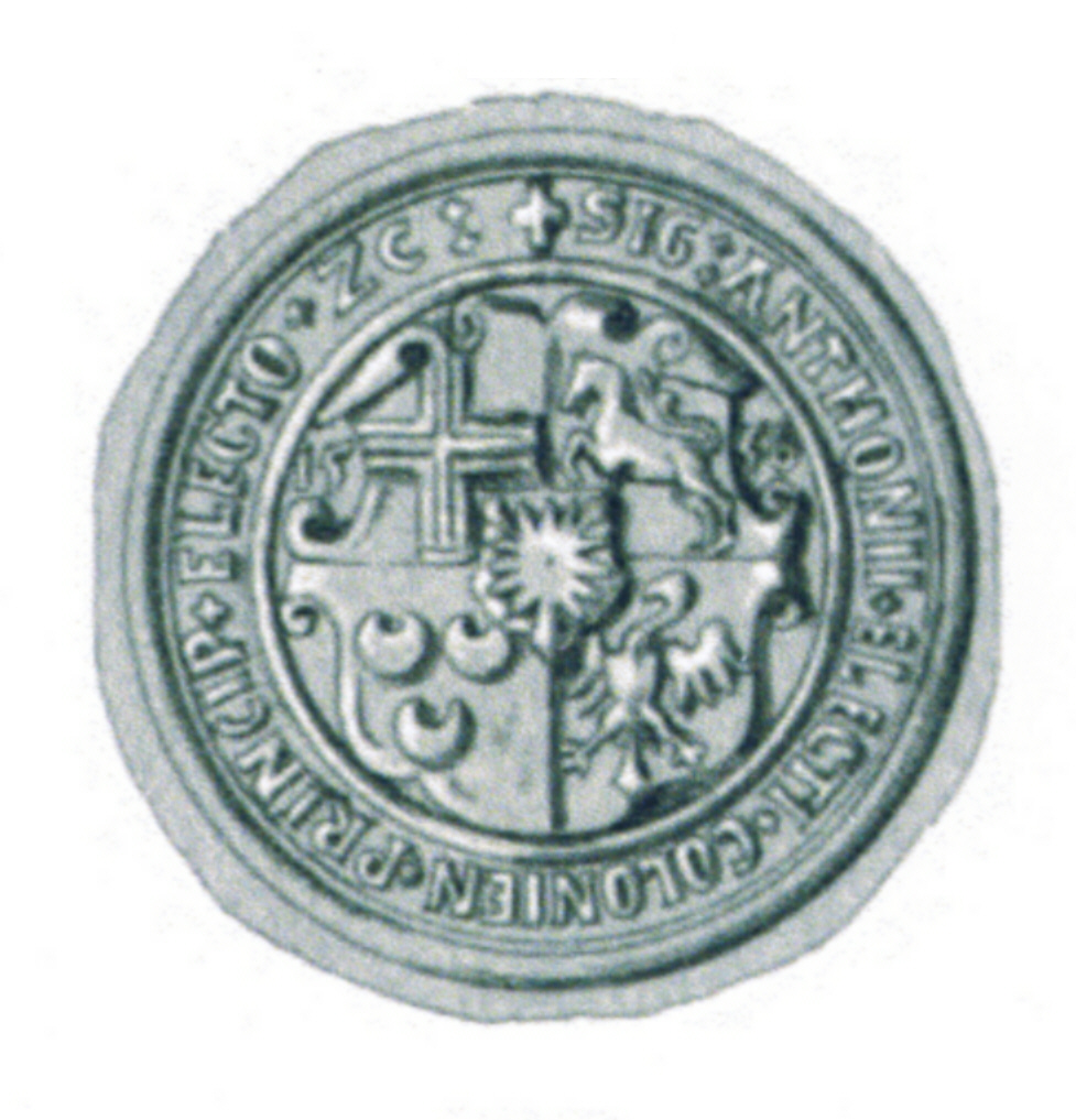 Siegel des Graf Anton von Schaumburg († 18. Juni 1558), von 1557 bis 1558 Erzbischof des Erzbistums Köln.Der war jüngere Bruder seines Vorgängers Adolf III. von Schaumburg und Sohn des Grafen Jobst von Schaumburg und Holstein-Pinneberg, wurde am 26. Oktober 1556 zum Erzbischof gewählt und am 6. Oktober 1557 als solcher durch Papst Paul IV. bestätigt. Das Siegel stammt aus der Zeit um 1556-1558.